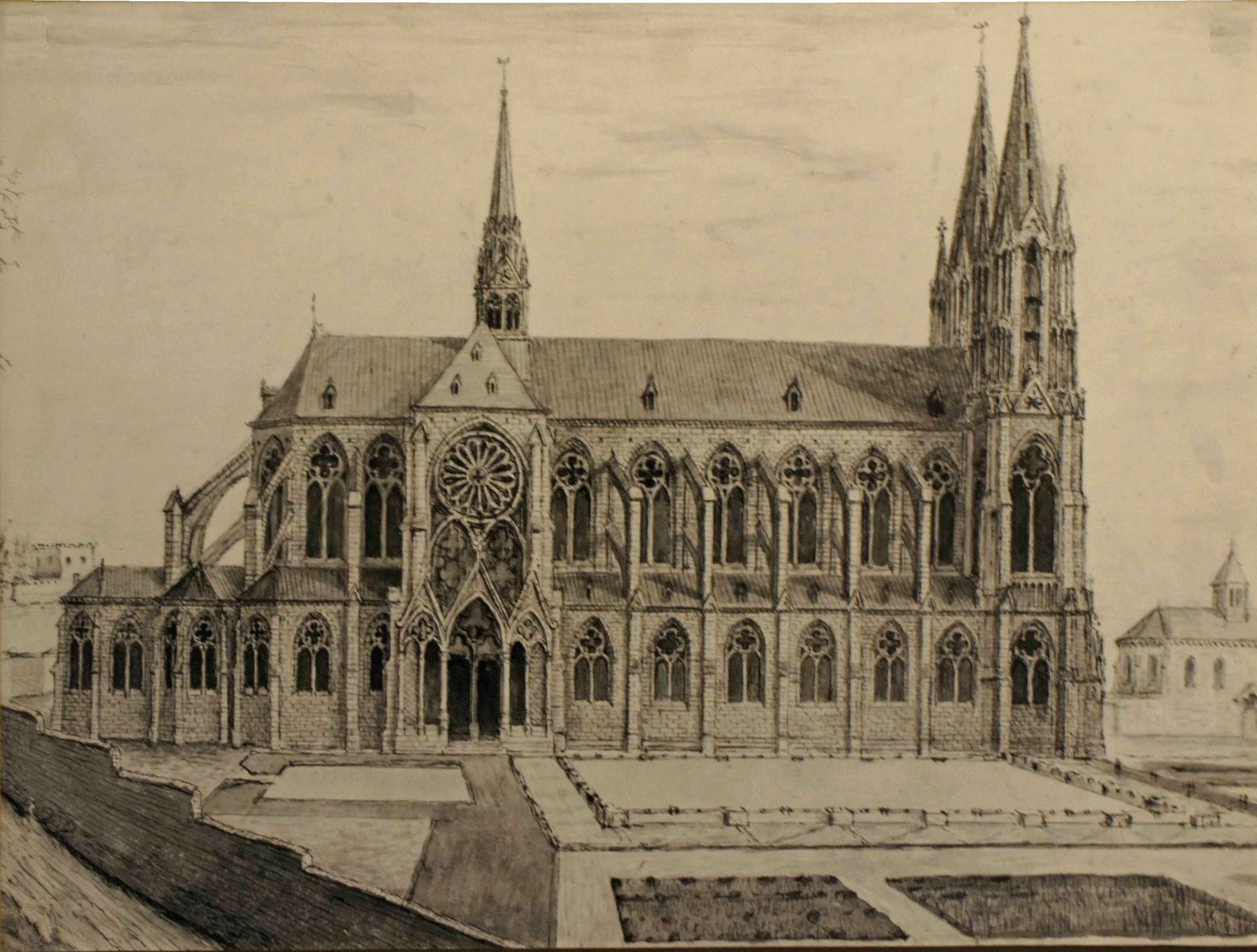 Une gravure de l'ancienne église st-Nicaise de Reims, vue du portail nord.